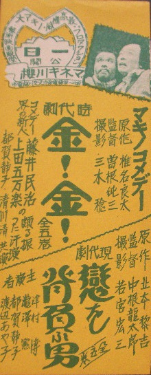 『金!金! 時代篇』『恋を背負う男』、1926年公開時のポスター